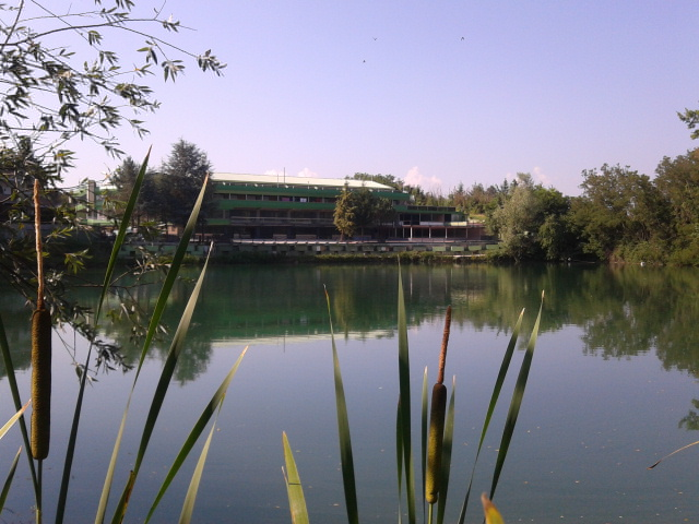 Il laghetto di Magliano dei Marsi